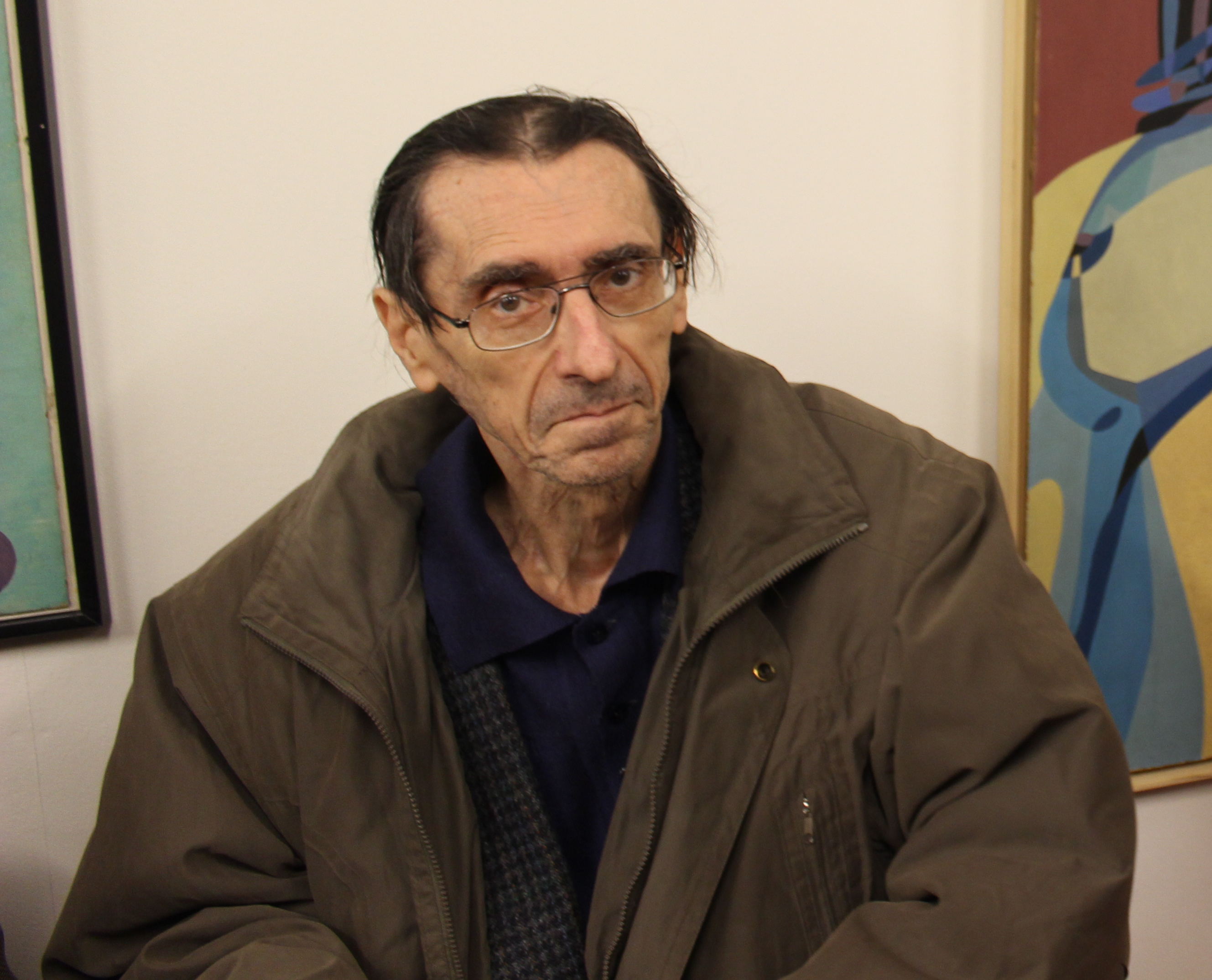 Pavel Weigel na Maxiautogramiádě konané v pražské galerii Mánesova 54 péčí Vratislava Ebra.